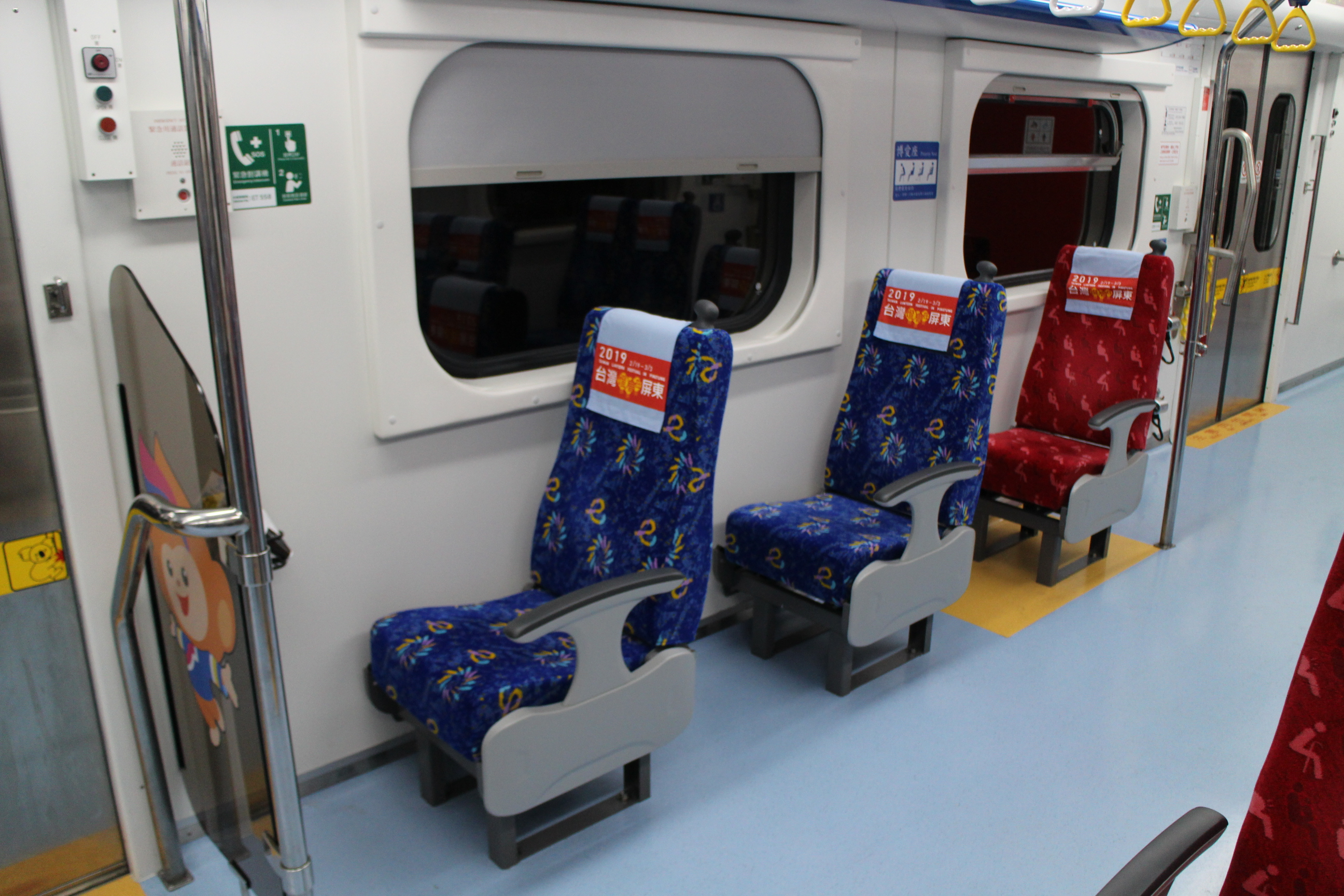 台湾鉄路管理局EMU500形電車 屏東仕様 座席